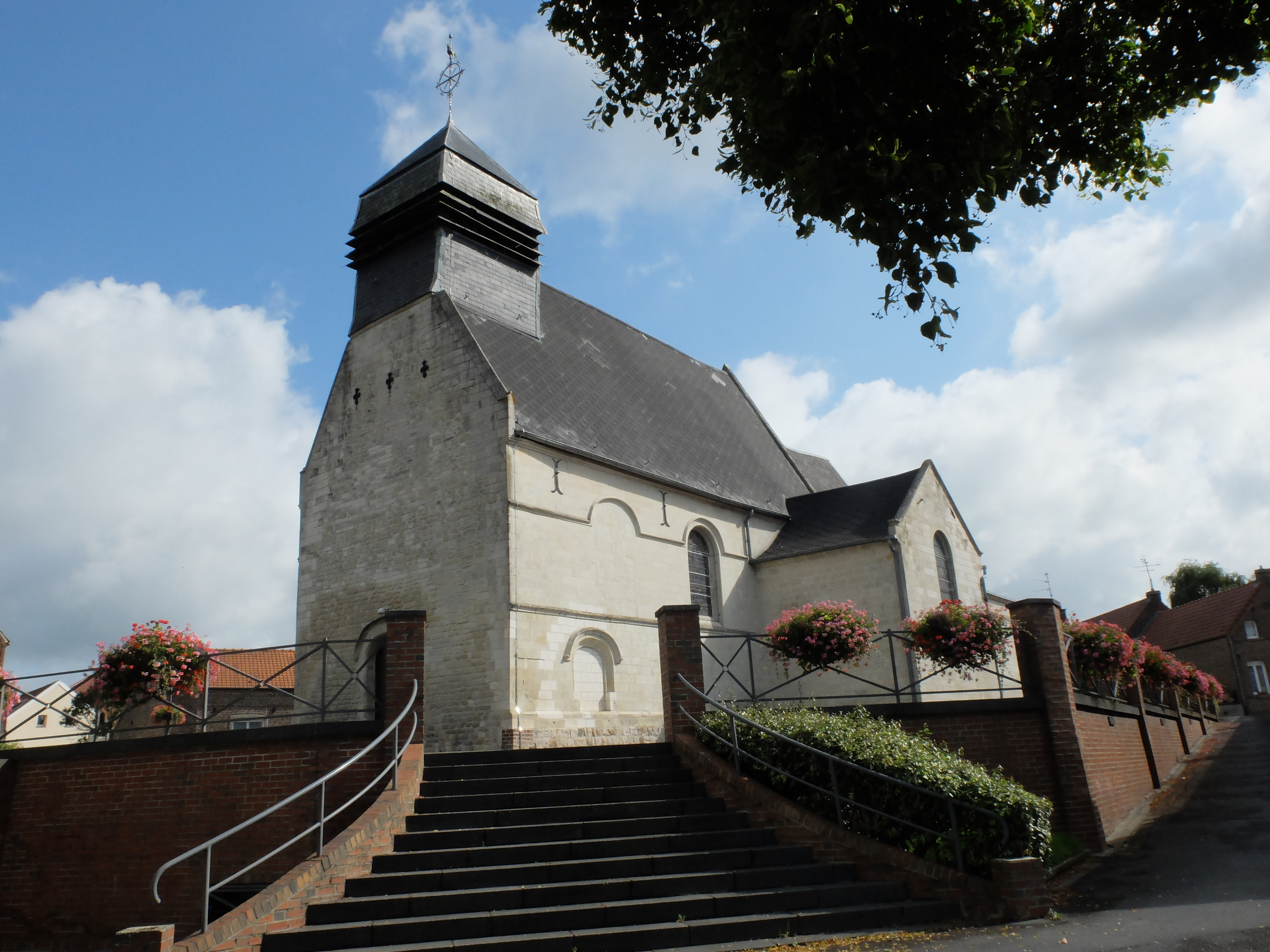 Vue de l'église Saint-Martin de Lieu-Saint-Amand.